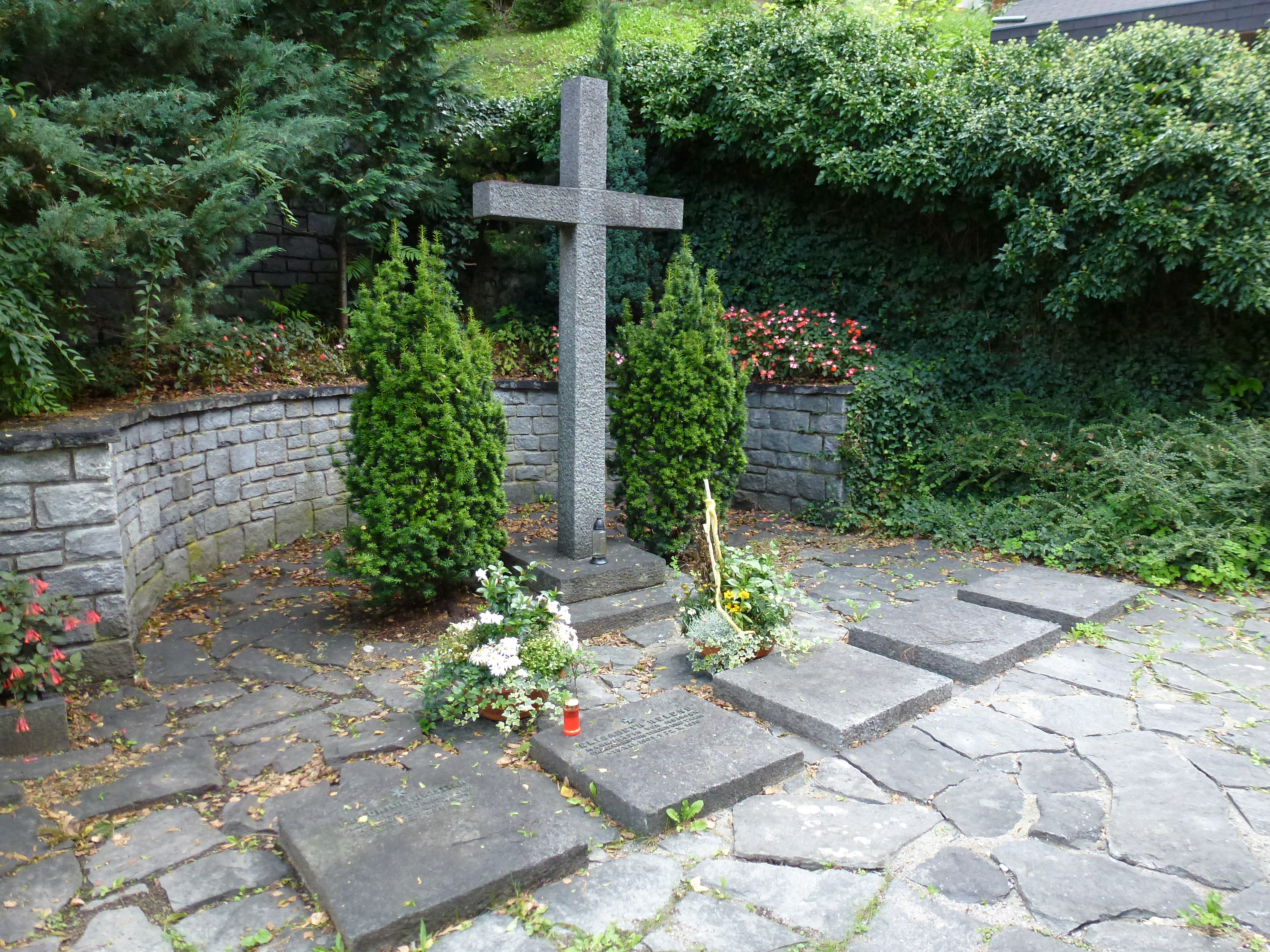 Grablege der Wettiner bei der Königskapelle Karrösten